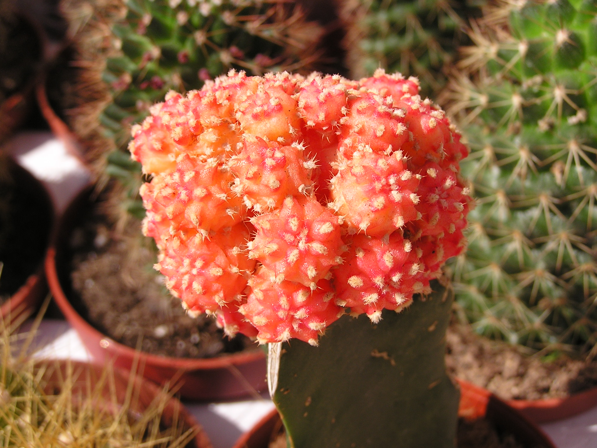 Донецк. Празднование дня города и дня шахтёра. Выставка цветов